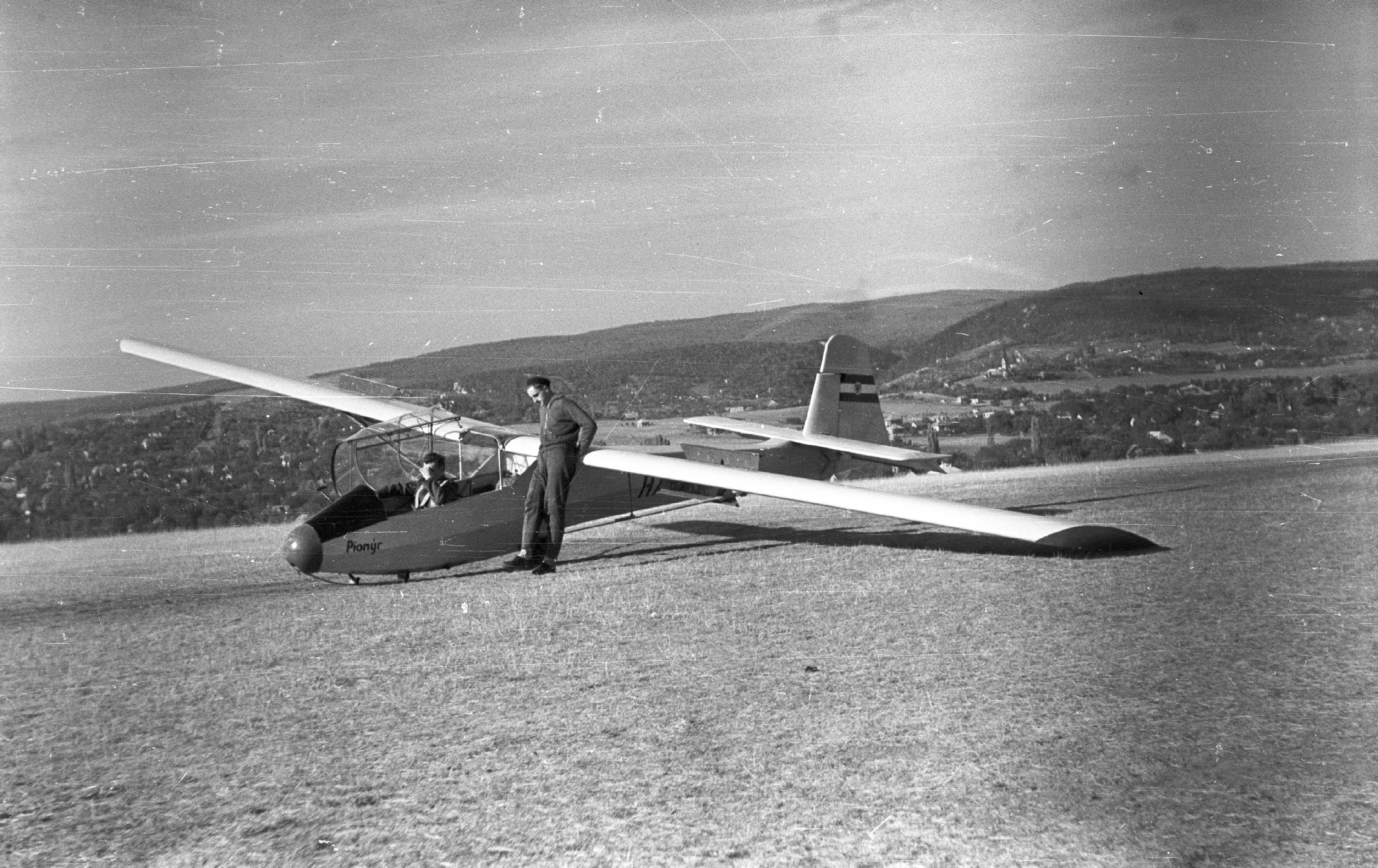 Letov LF-109 Pionyr vitorlázó repülőgép. Location: Hungary, Budapest II., Hármashatárhegy Airport Tags: sailplane, airport, Czechoslovak brand, Budapest Title: Letov LF-109 Pionyr vitorlázó repülőgép.